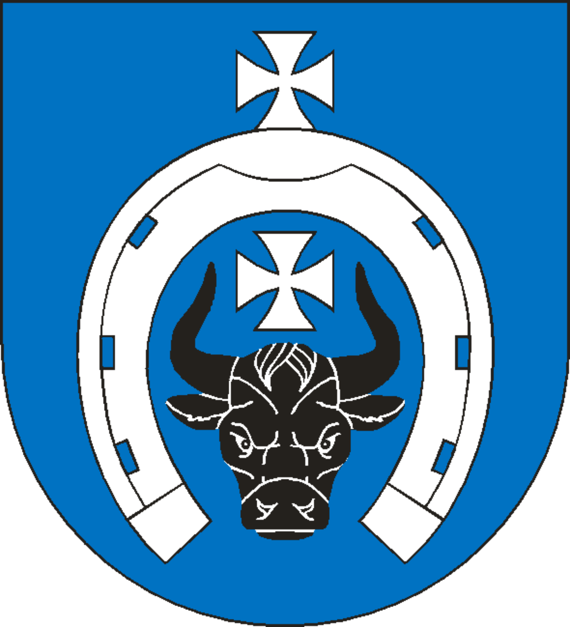 Herb gminy wiejskiej Bielsk Podlaski.